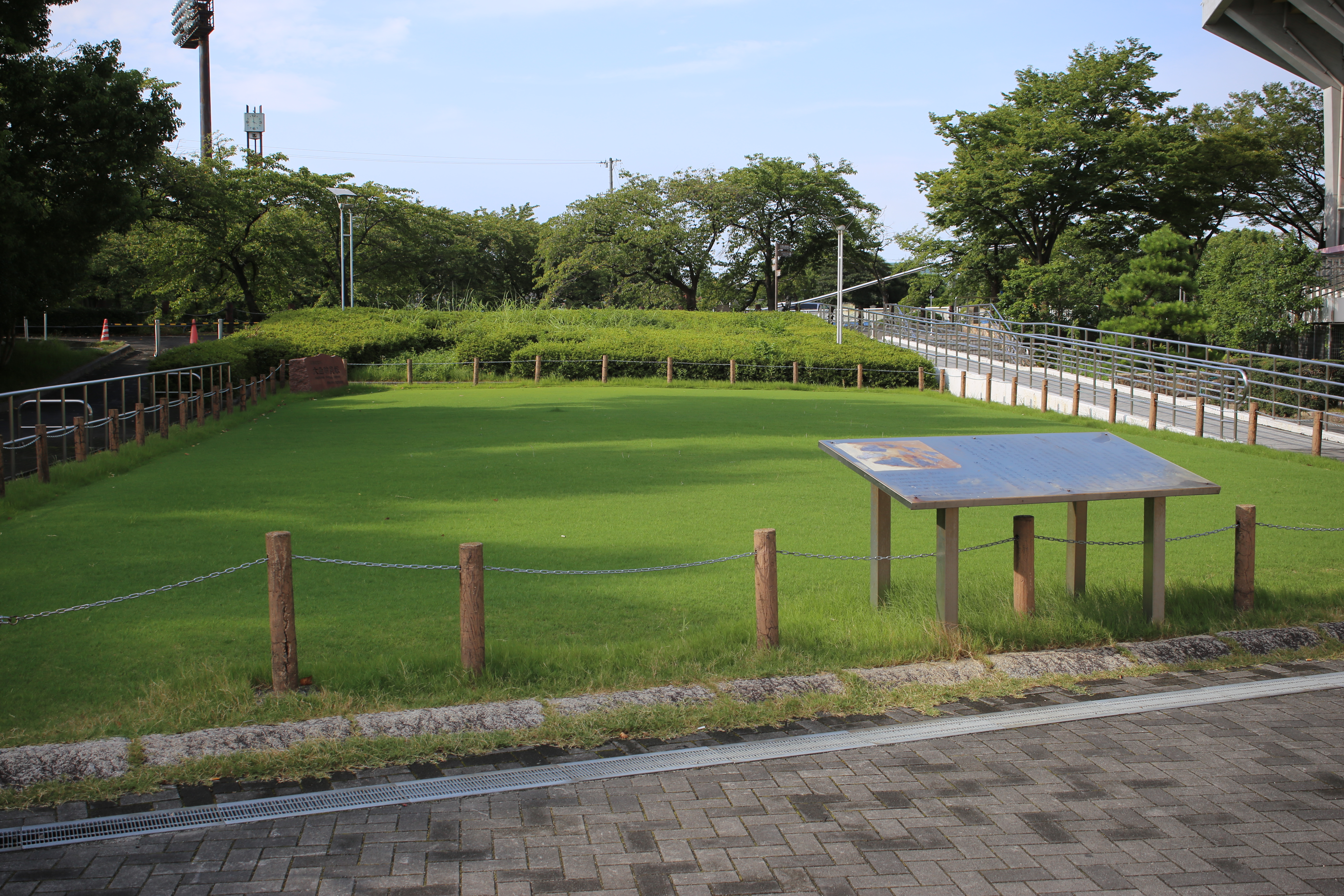 名古屋市瑞穂区の瑞穂公園内大曲輪貝塚